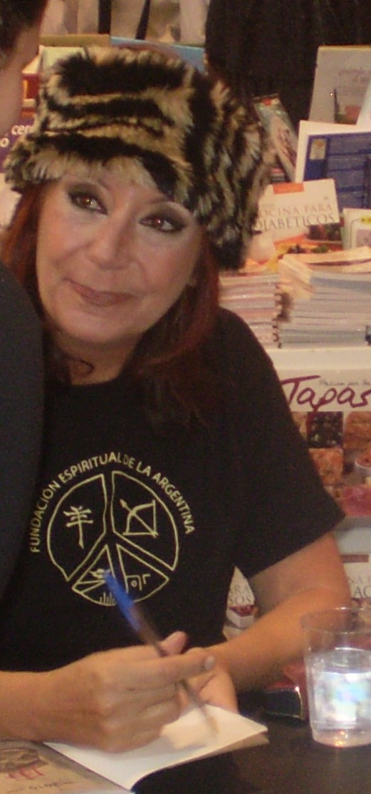 Ludovica Squirru en la Feria del Libro